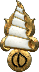 Insigne de la compagnie disciplinaire de Légion étrangère en Extrême-Orient